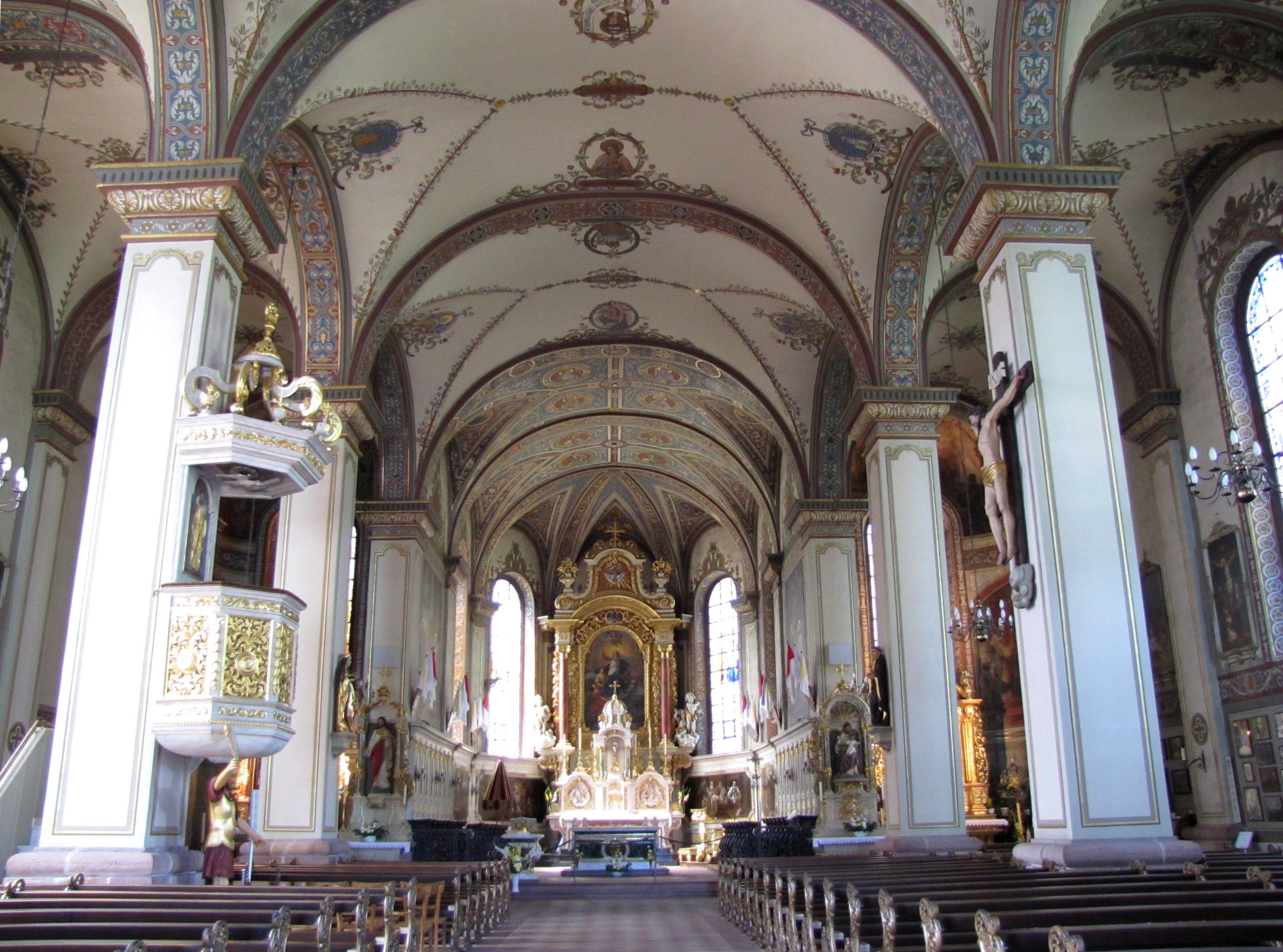 Alsace, Haut-Rhin, Jungholtz, Basilique Notre-Dame (1723) de Thierenbach (PA00085469, IA00111918).Vue intérieure de la nef vers le chœur.